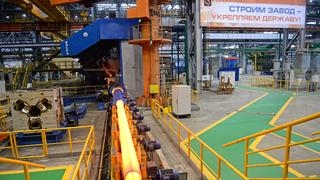 Северский трубный завод.